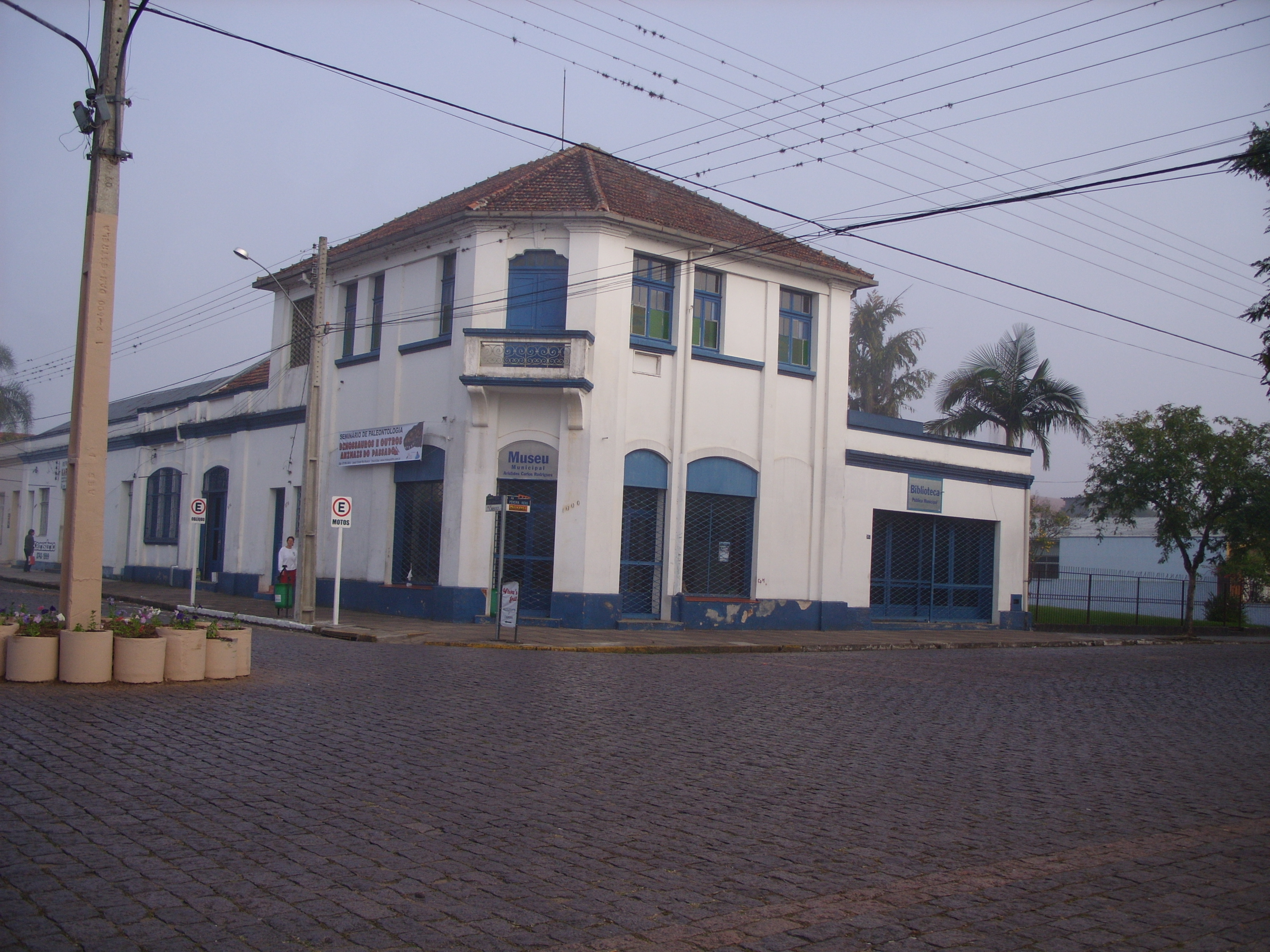 Fachada do Museu Aristides Carlos Rodrigues, na cidade de Candelária, Rio Grande do Sul, Brasil.